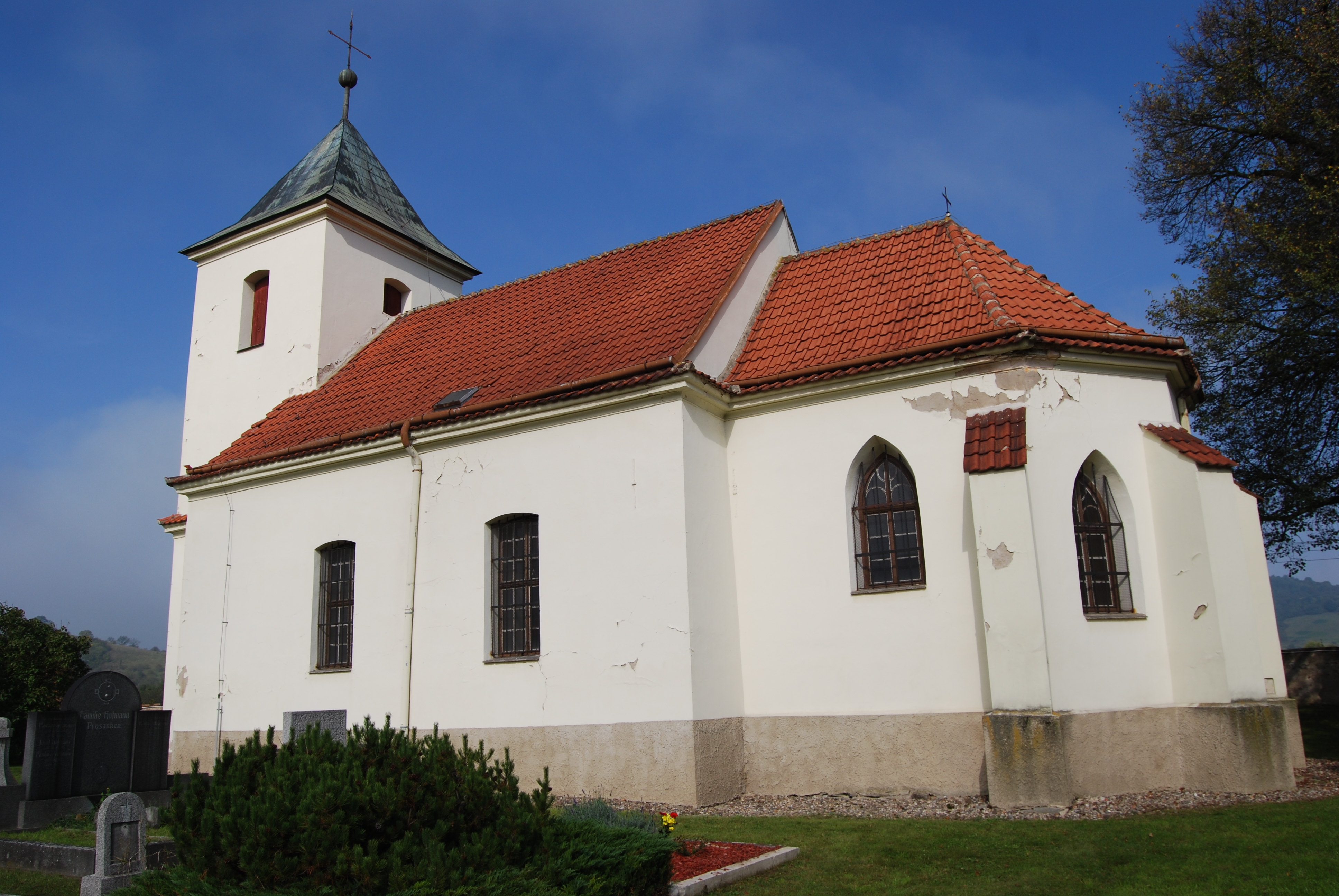 Kostel svatého Václava, Brozánky (Řehlovice)